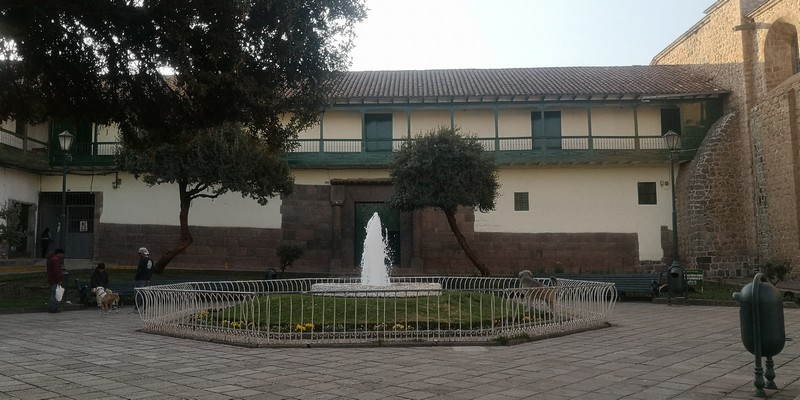 Puerta principal de la Casa Silvac y de la fuente del Parque de la Madre en Cusco, Perú